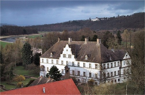 Schloss Wehrden an der Weser, im Hintergrund Fürstenberg, vom Kirchturm aus gesehen